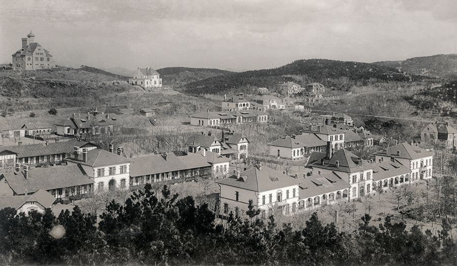 江苏路青医附院